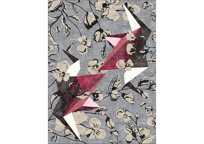 FLYINGGRU